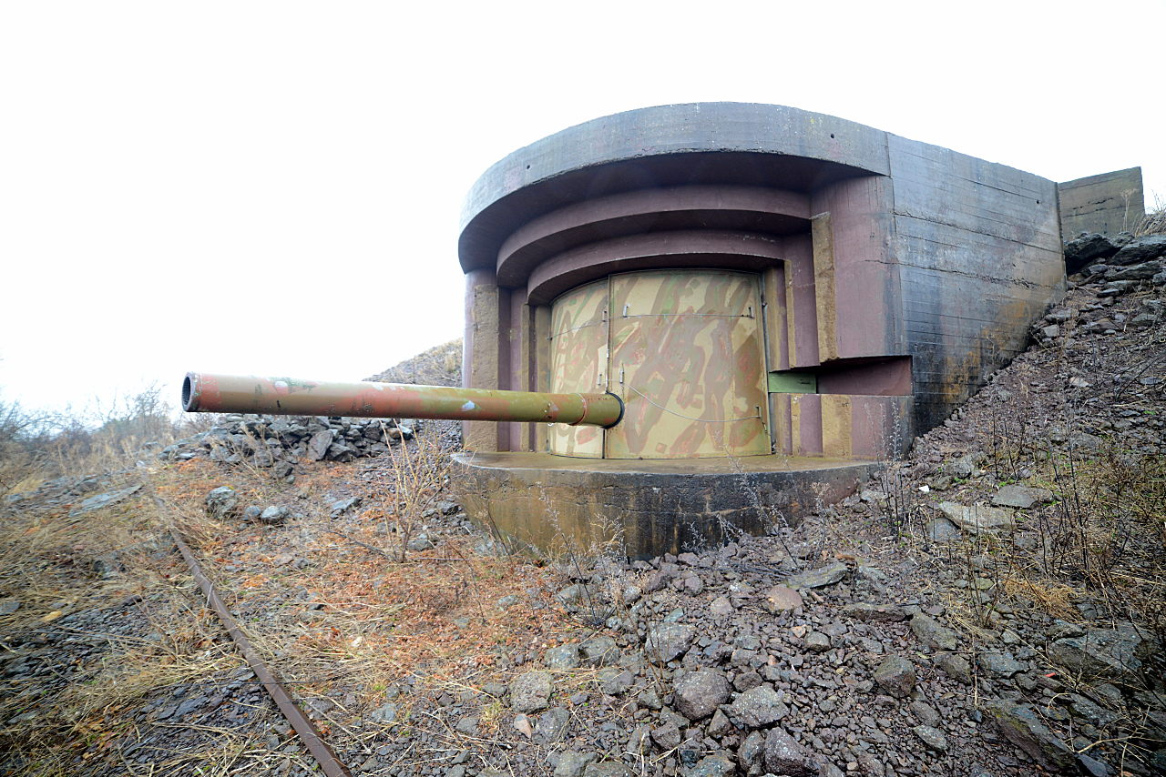 Rauøy fort i Oslofjorden